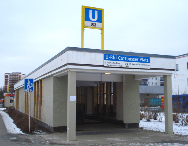 Eingang U-Bahnhof Cottbusser Platz Berlin-Hellersdorf